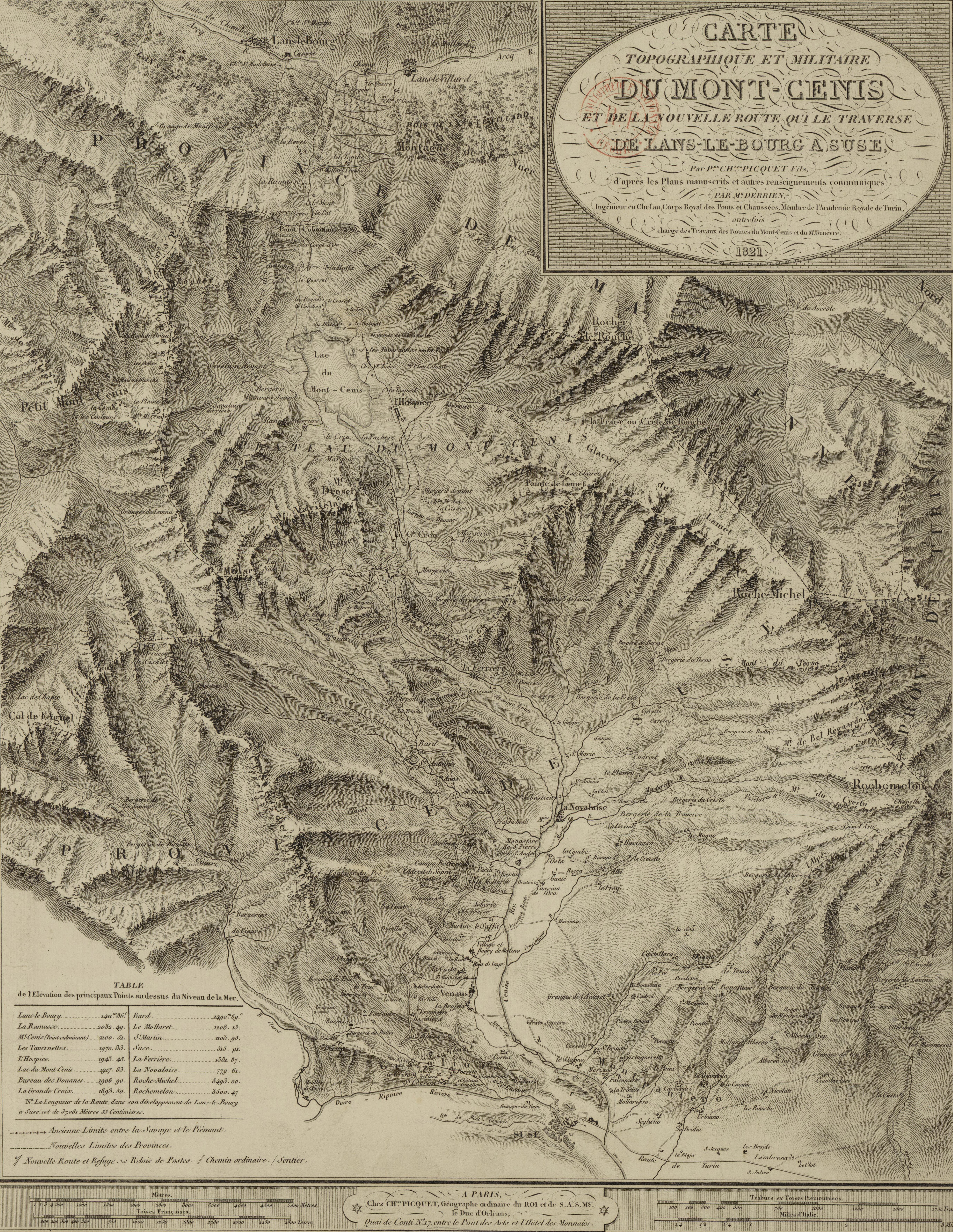 Carte topographique et militaire sarde du mont Cenis et de la nouvelle route qui le traverse, de Lans-le-Bourg à Suse.